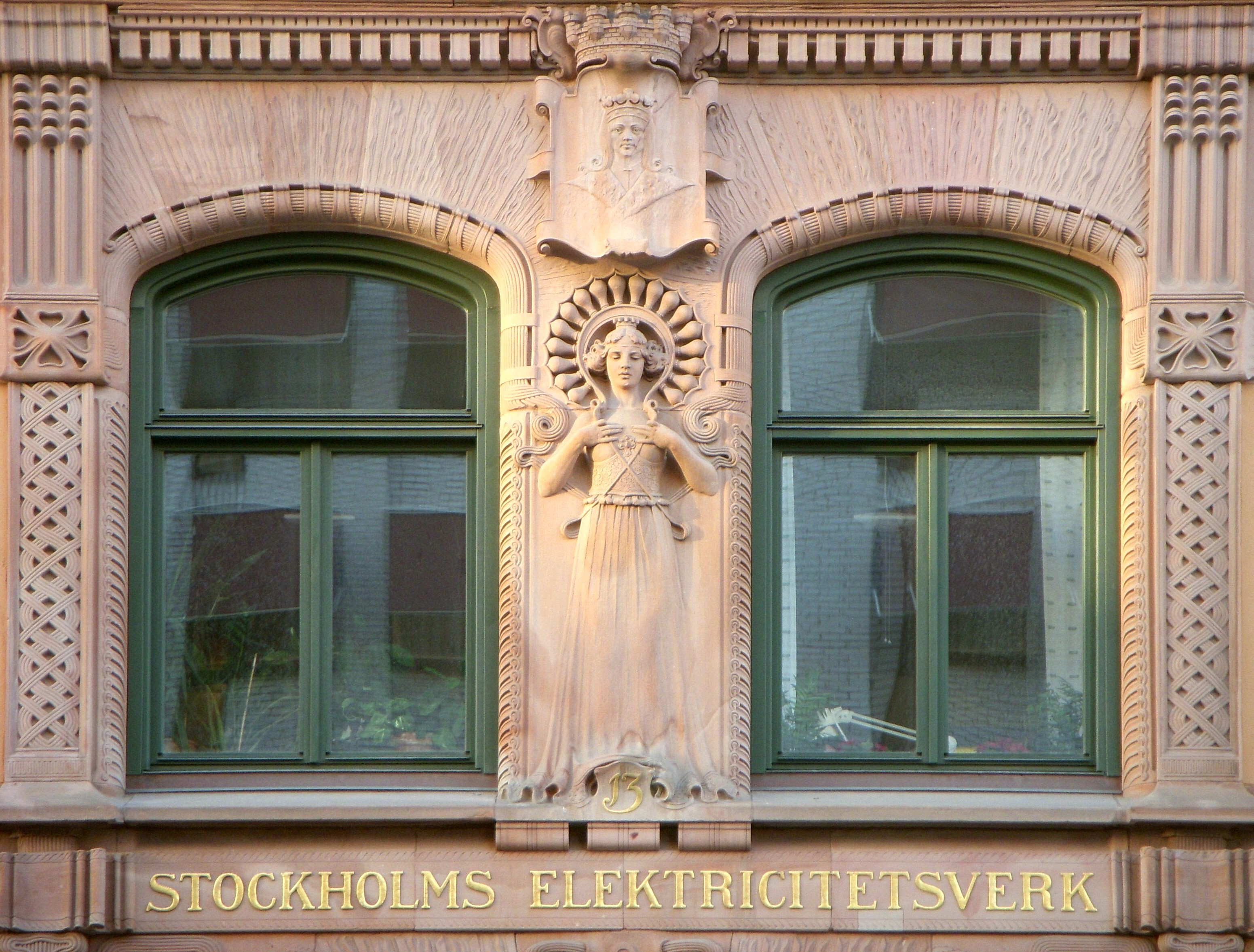 Tulestationen i Stockholm är dekorerad med röd Övedssandsten, byggnaden är ritad av Ferdinand Boberg